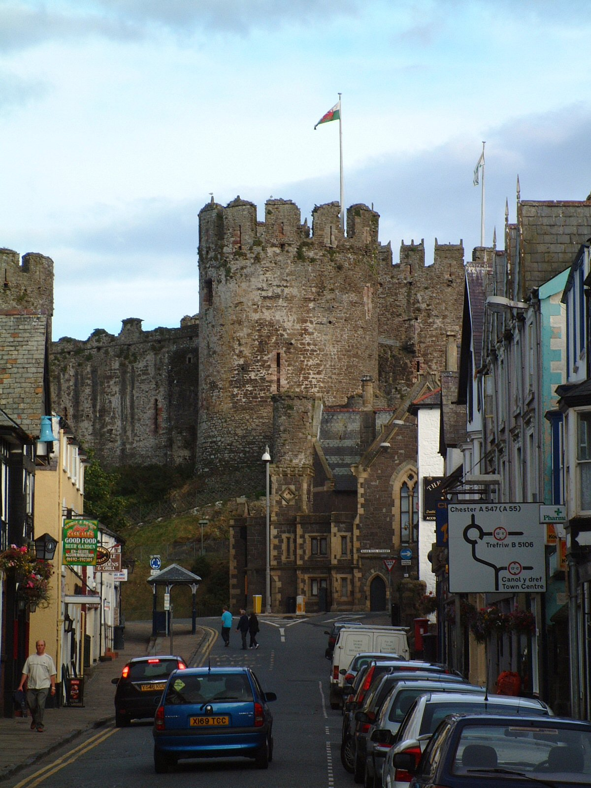 Conwy Castle